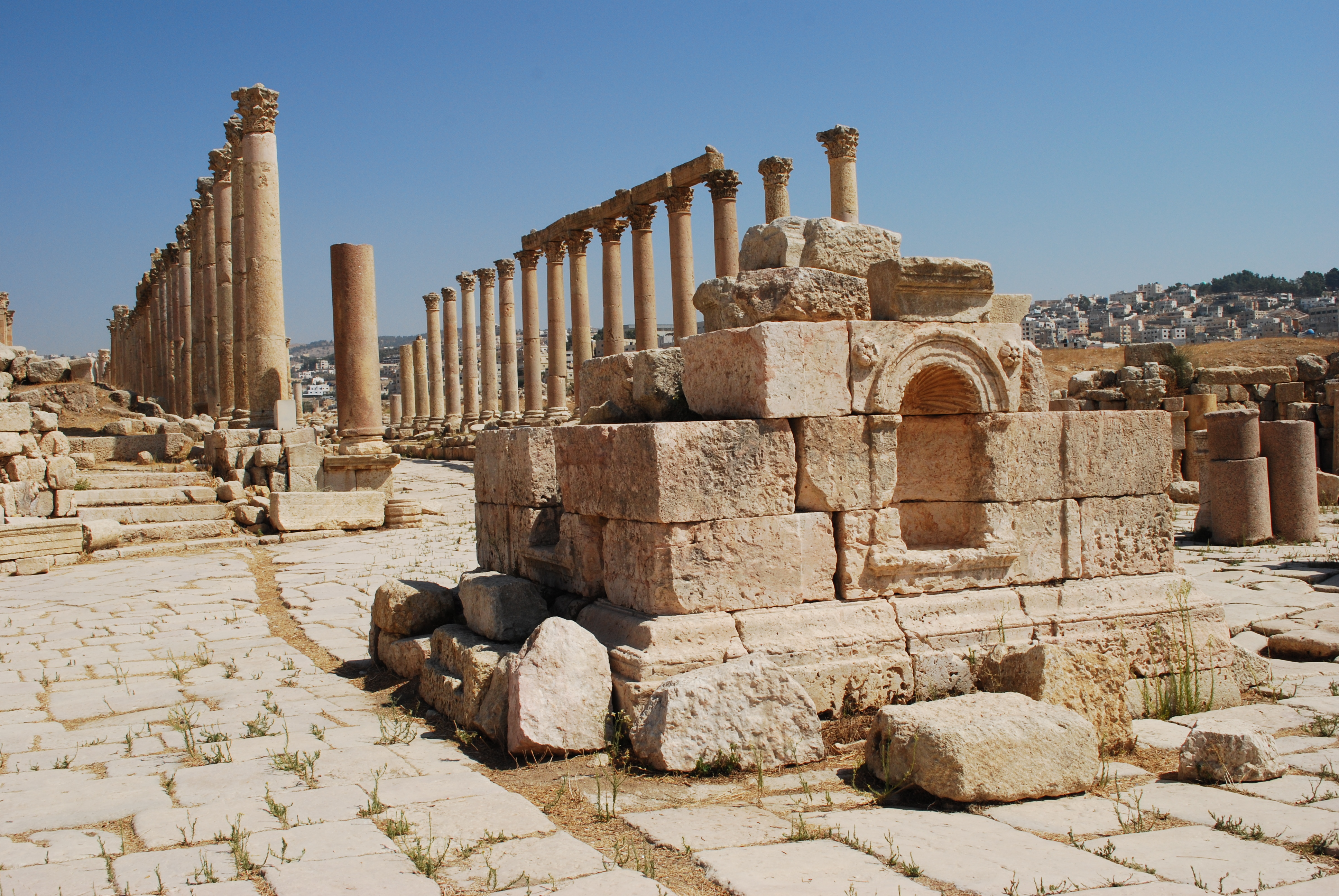 Tétrapyle sud et cardo maximus de Jerash.